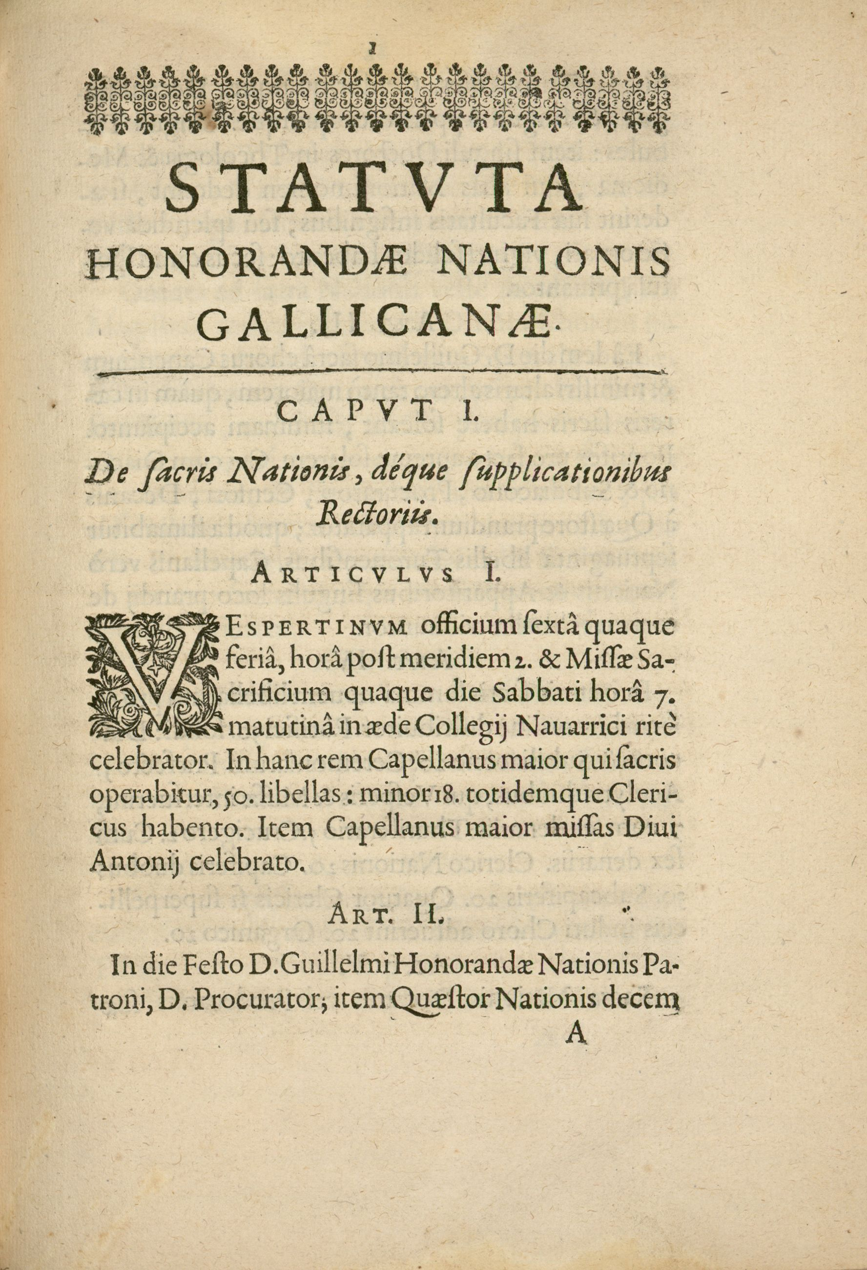 Monographie imprimée en latin, portant sur les statuts de la nation française de l'ancienne Université de Paris.